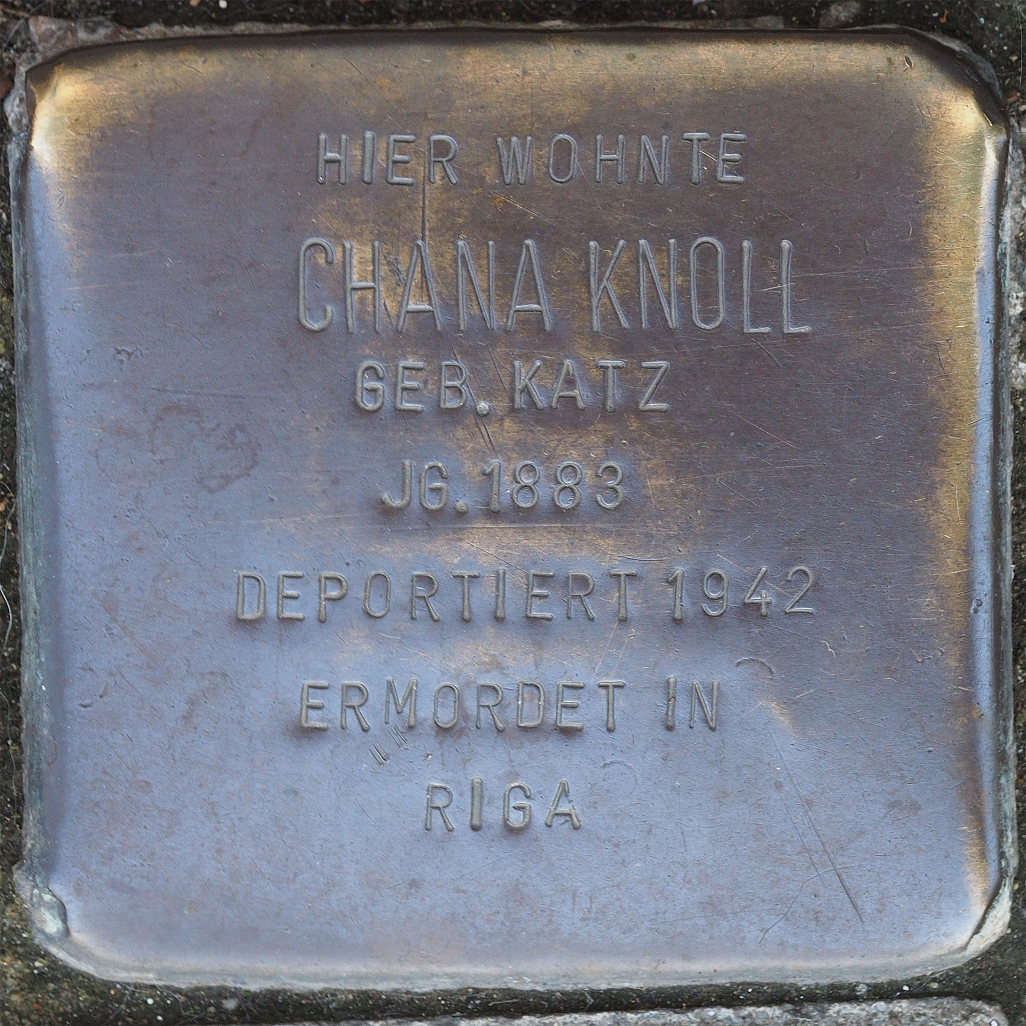 Stolperstein VIE: Knoll, Chana